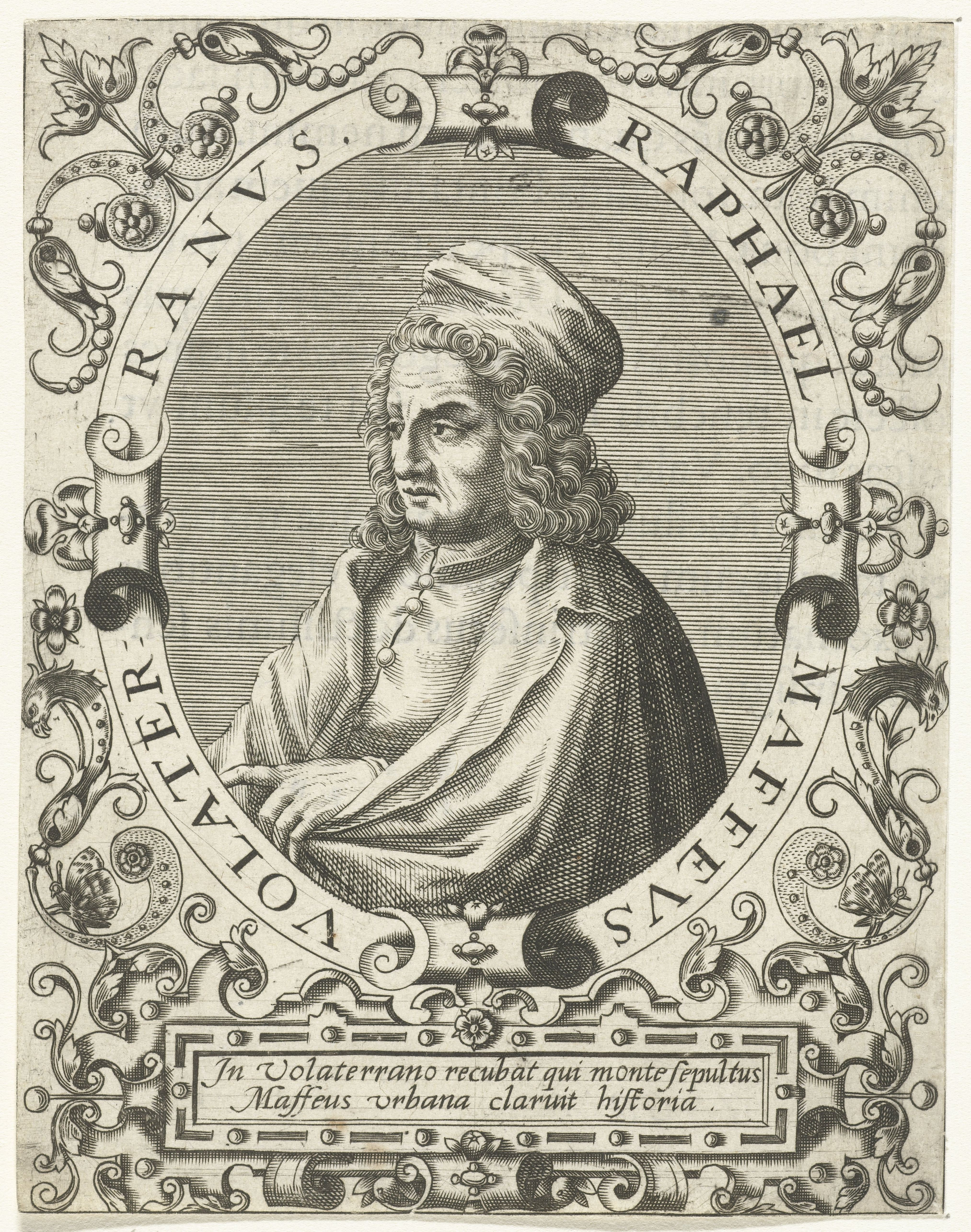 IdentificatieTitel(s): Portret van Raffaele MaffeiRaphael Maffeus (titel op object)Objecttype: prent boekillustratie Objectnummer: RP-P-1909-4336Catalogusreferentie: Singer 58354Opschriften / Merken: verzamelaarsmerk, verso, gestempeld: Lugt 2228Omschrijving: Portret van de Italiaanse geleerde Raffaele Maffei, in ovaal met randschrift. Onder het portret een lofdicht.VervaardigingVervaardiger: prentmaker: Theodor de Bryprentmaker: Johann Theodor de Brynaar ontwerp van: Jean Jacques Boissard (mogelijk)Plaats vervaardiging: Frankfurt am MainDatering: ca. 1597 - ca. 1599Fysieke kenmerken: gravure en tekst in boekdrukMateriaal: papier Techniek: graveren (drukprocedé) / boekdrukAfmetingen: plaatrand: h 140 mm × b 100 mmToelichtingGemaakt voor: J.J. Boissard, Icones virorum illustrium doctrina &c eruditione praestanti um contines. Frankfurt am Main: de Bry, 1597-1599.OnderwerpWie: Raffaello MaffeiVerwerving en rechtenVerwerving: aankoop 1905Copyright: Publiek domein